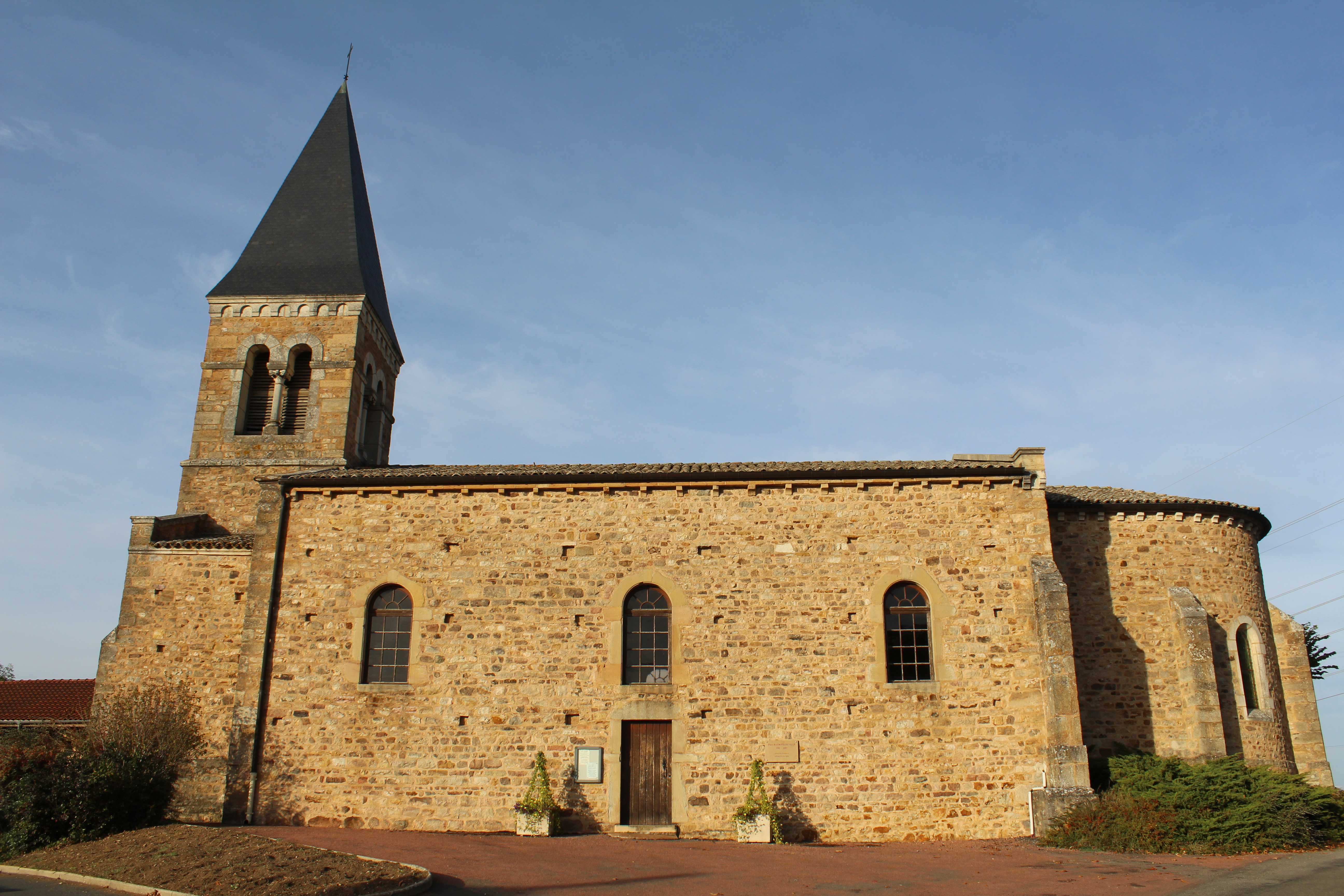 Église Saint-Jacques-le-Majeur de Serrières, Saône-et-Loire.